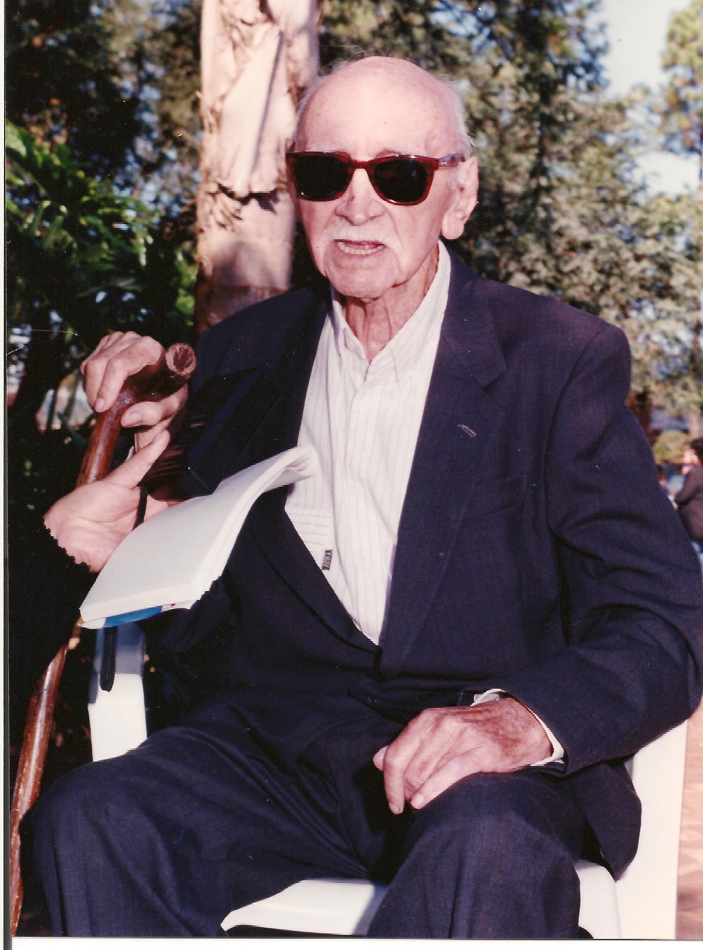 Miguel Romer, pionero. (7 de mayo de 1998).